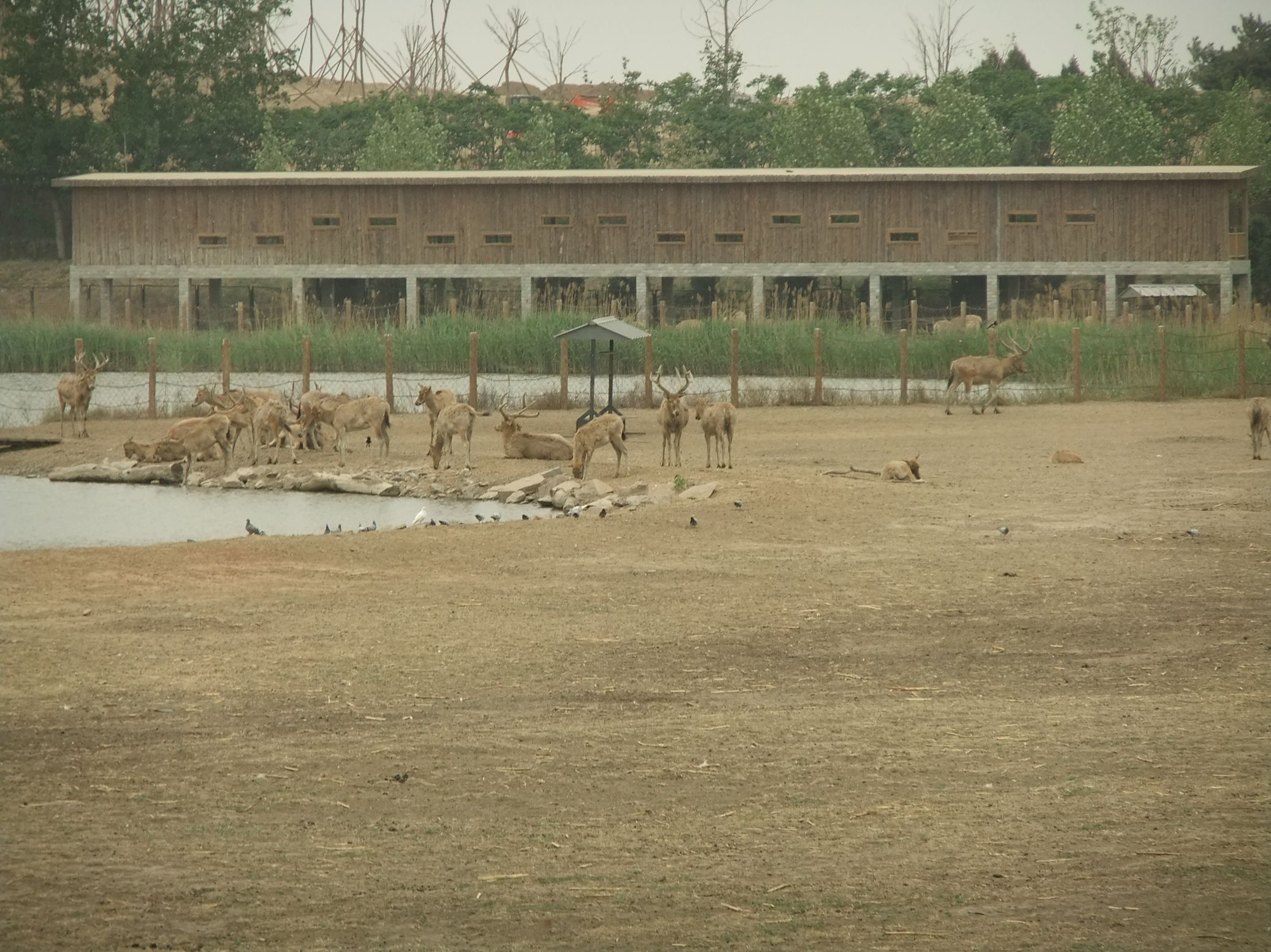 麋鹿 - Pere David's Deer - 2011.05